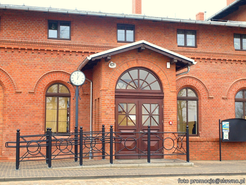 Dworzec kolejowy w Sławnie.Wejście główne.